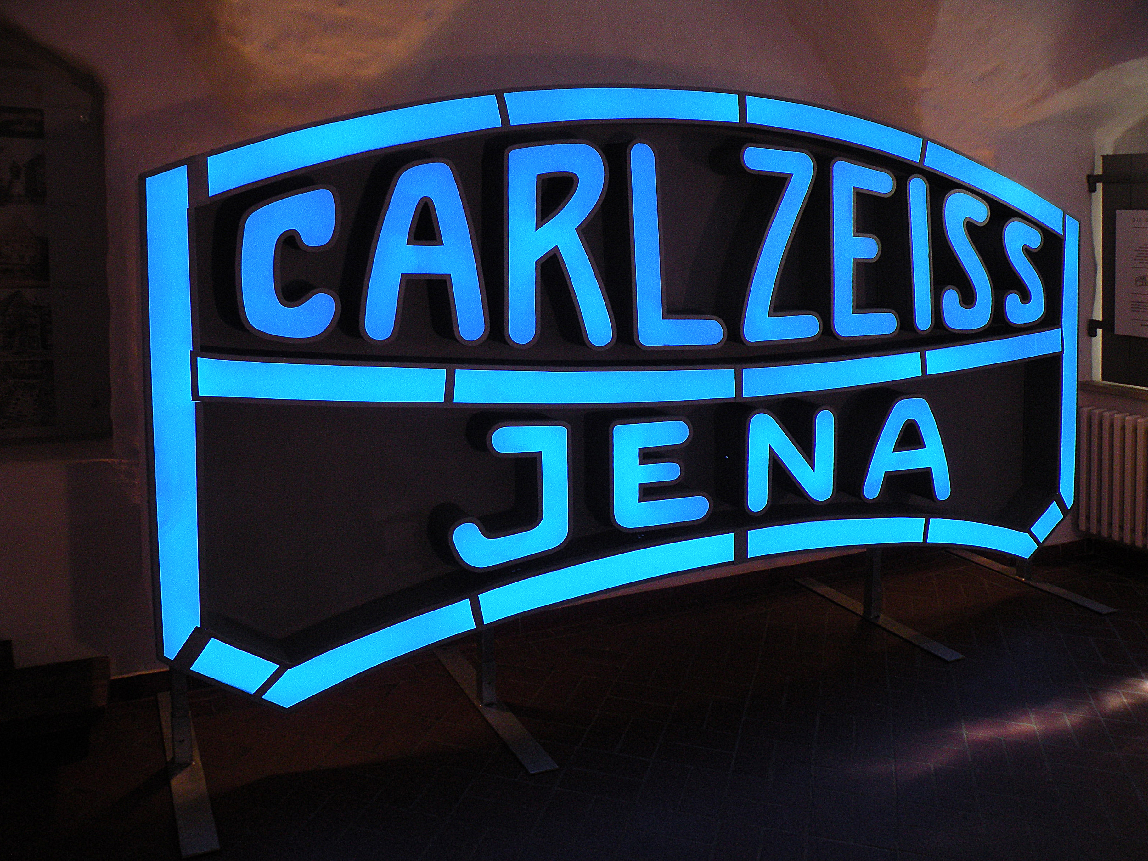 Исторический логотип фирмы в виде вывески на стадионе города